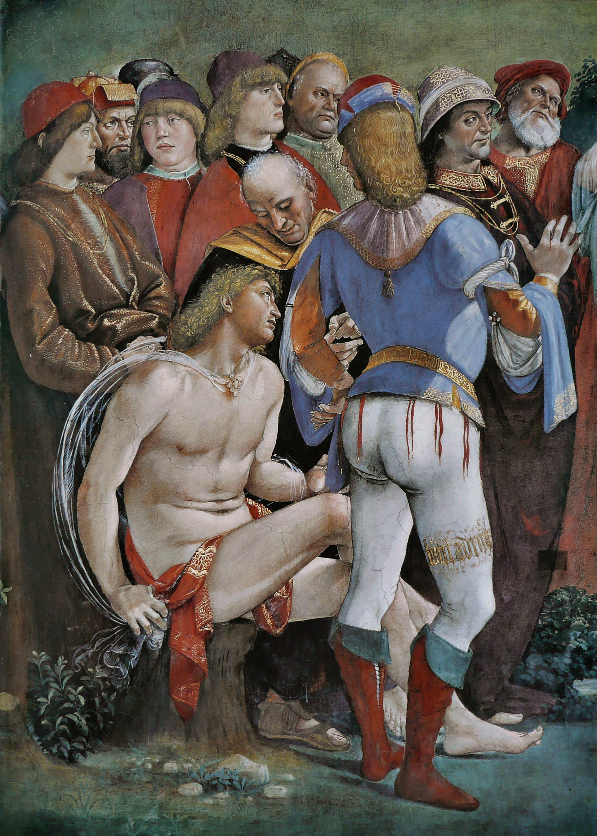 Testamento e morte di Mosè